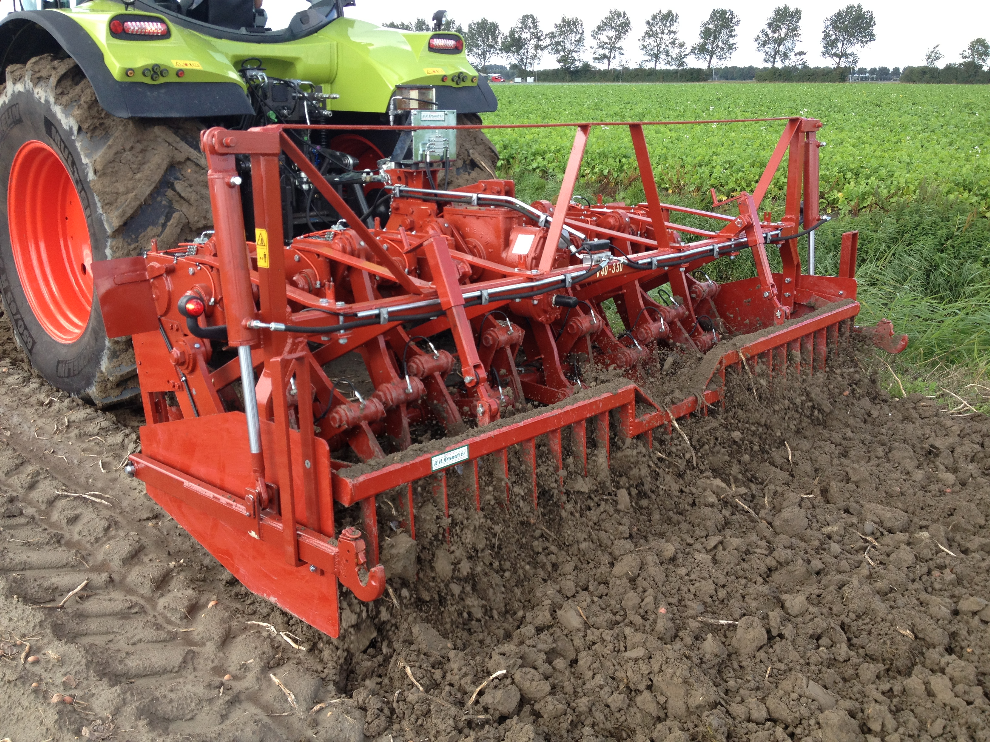 De spitmachines zijn agrarische machines die zijn ontworpen voor het losmaken en het doorbreken van de bodem. Het principe is hetzelfde als handmatig spitten met een schop, messen worden afwisselend in de grond geslagen, de kluiten worden opgetild en naar achteren geworpen. Vervolgens wordt het oppervlak afgevlakt door de werking van een hark. De spitmachines zijn aan de tractor gekoppeld met behulp van een standaard 3-punts hefinrichting en wordt met de aftakas aangedreven. Alle modellen zijn uitgerust met een versnellingspook bediening met twee snelheden, een aantal types met doorlopende aftakas en optioneel is wielen in plaats van glijsloffen.